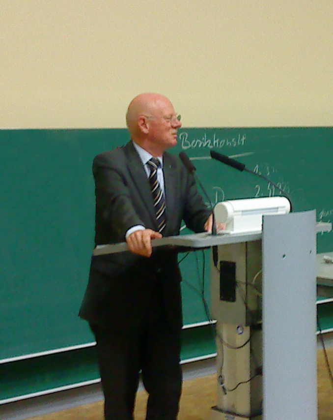 Gerhard Vigener im Audimax Tübingen